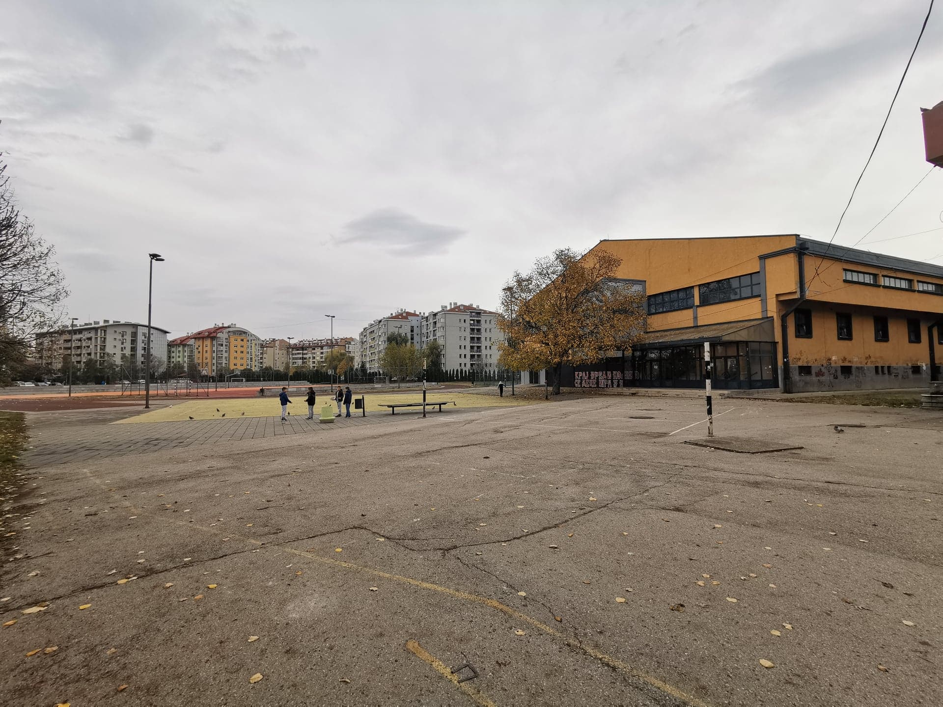 ОШ Душан Радовић Ниш - школско двориште